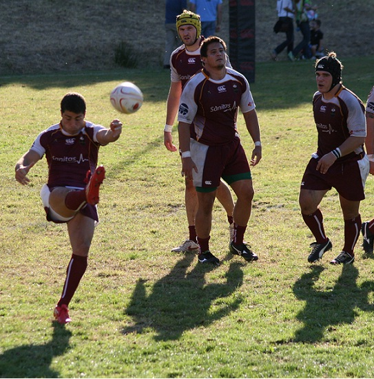 Fichajes Alcobendas. Temporada 2011-2012